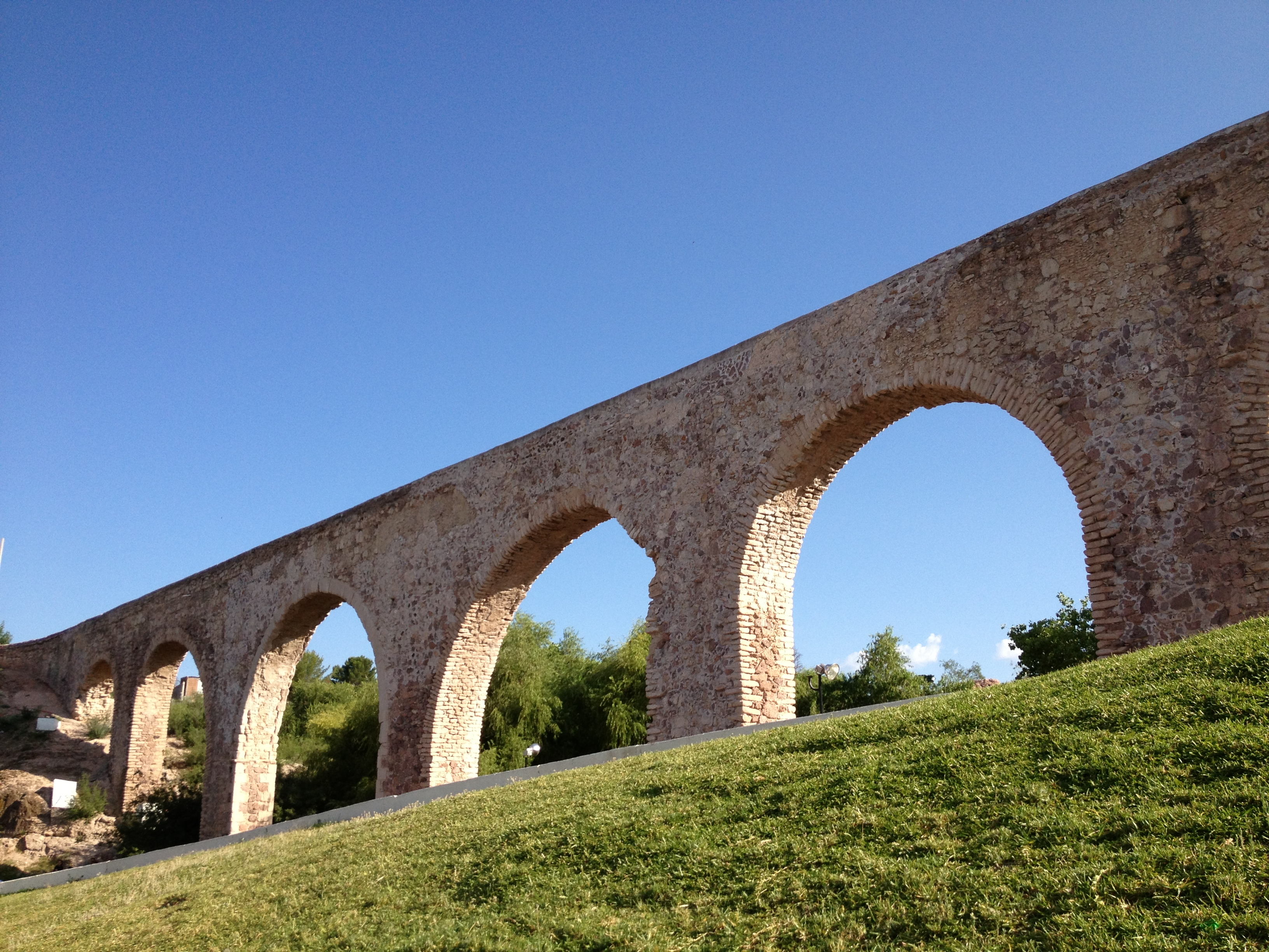 El Acueducto de Chihuahua en su tramo del Parque Acueducto